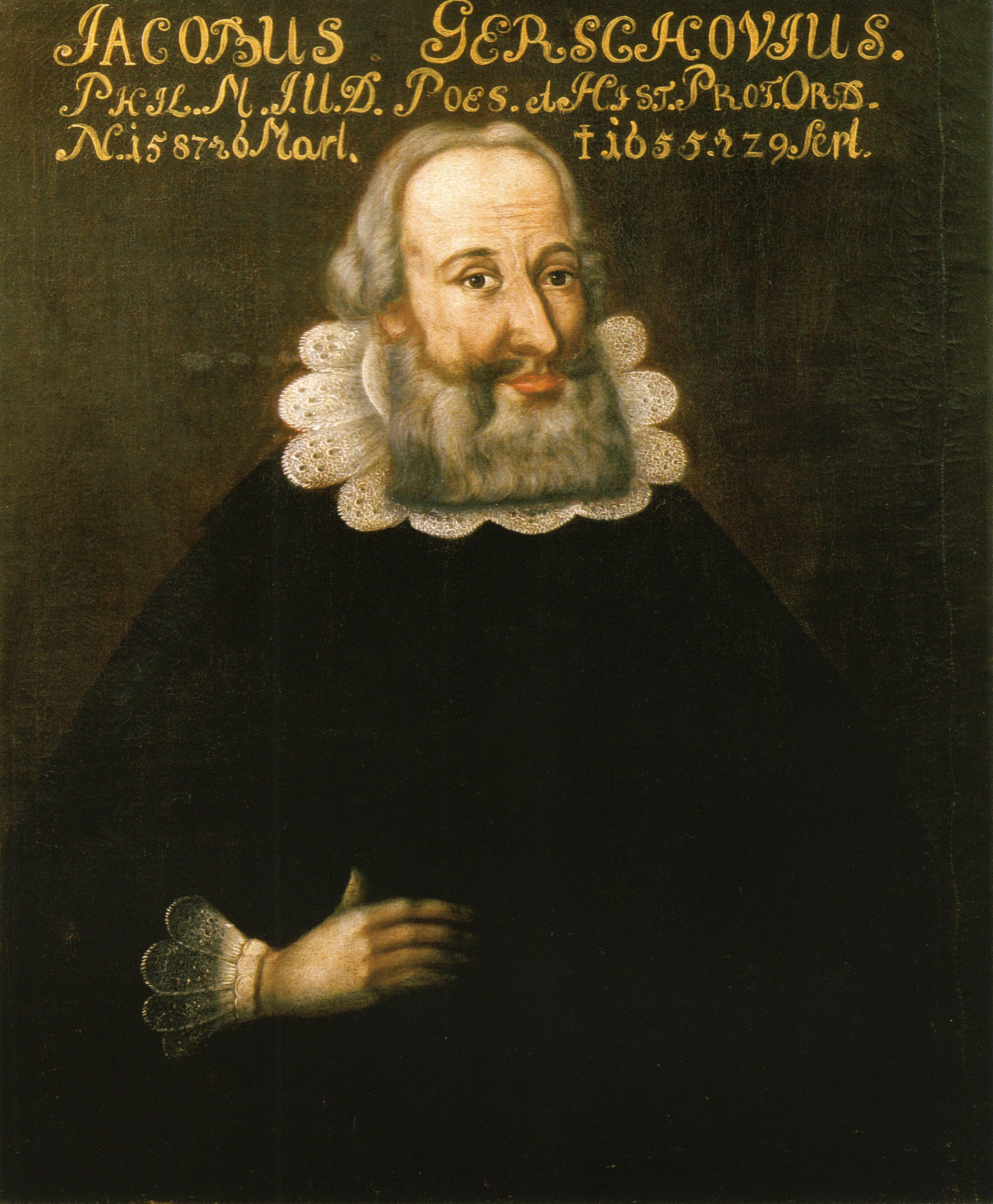 Jacob Gerschow (1587–1655)